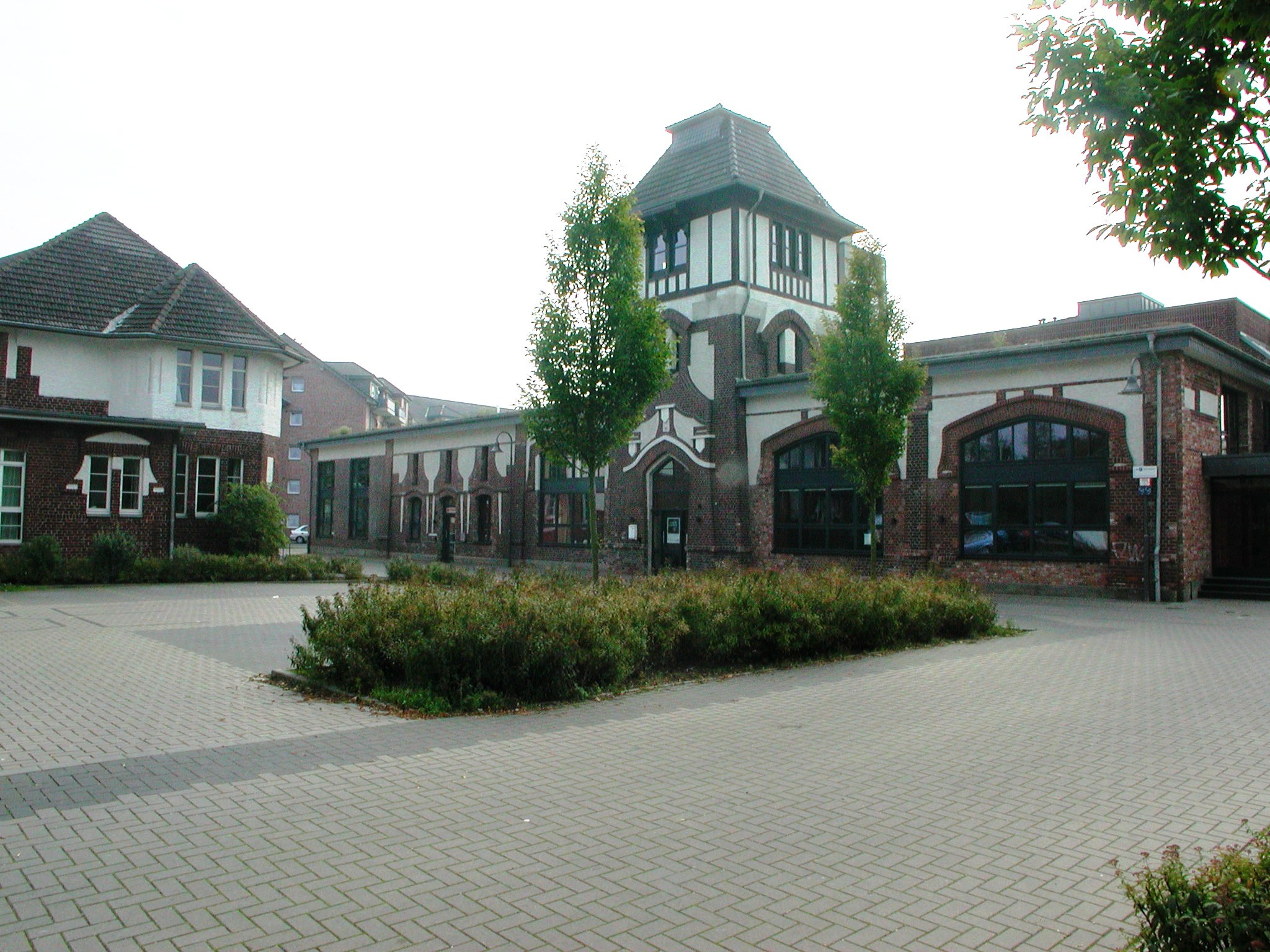 Der im Jugendstil 1905 erbaute ehemalige Schlachthof in Moers